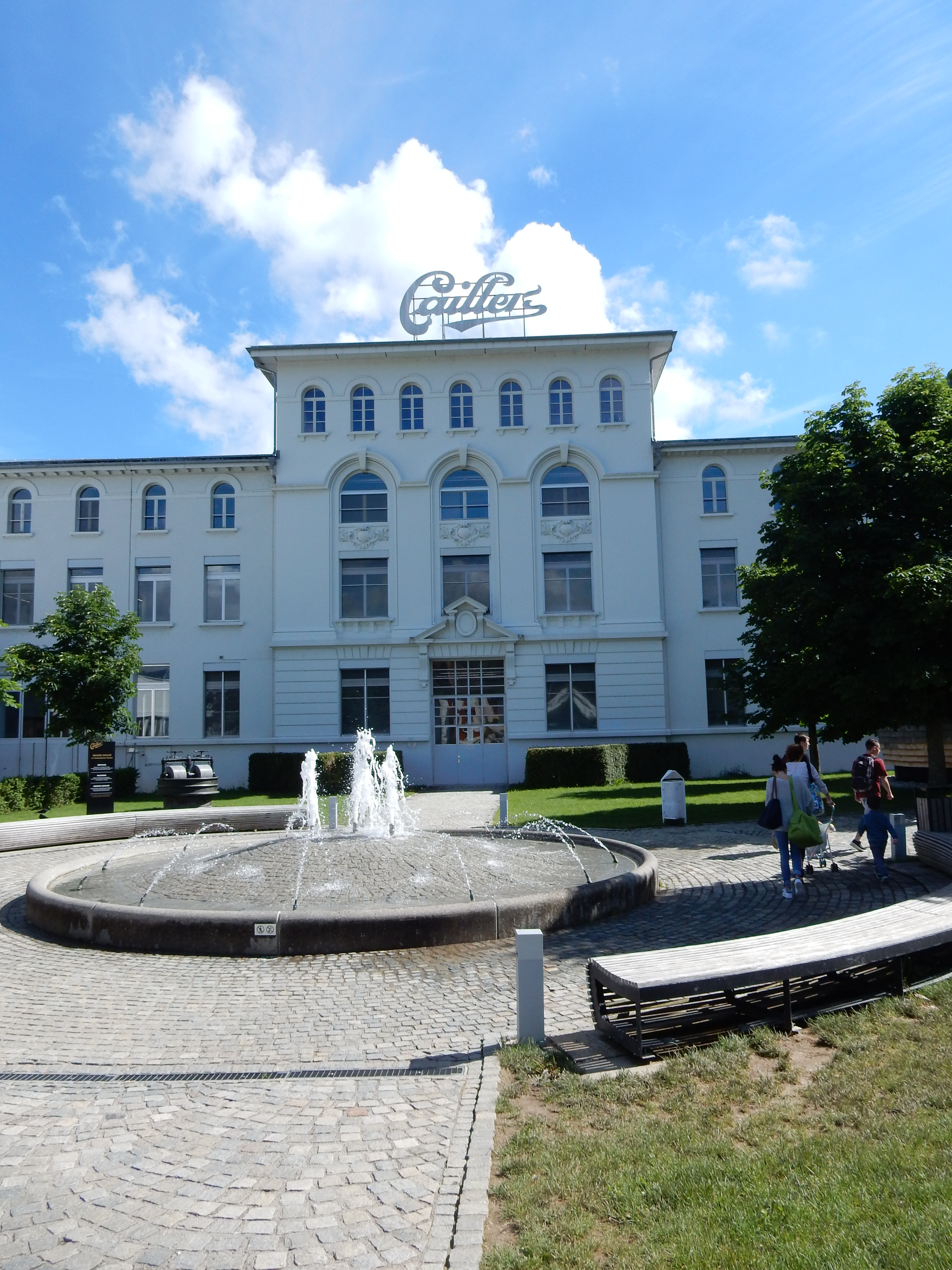 1636 Broc, Switzerland